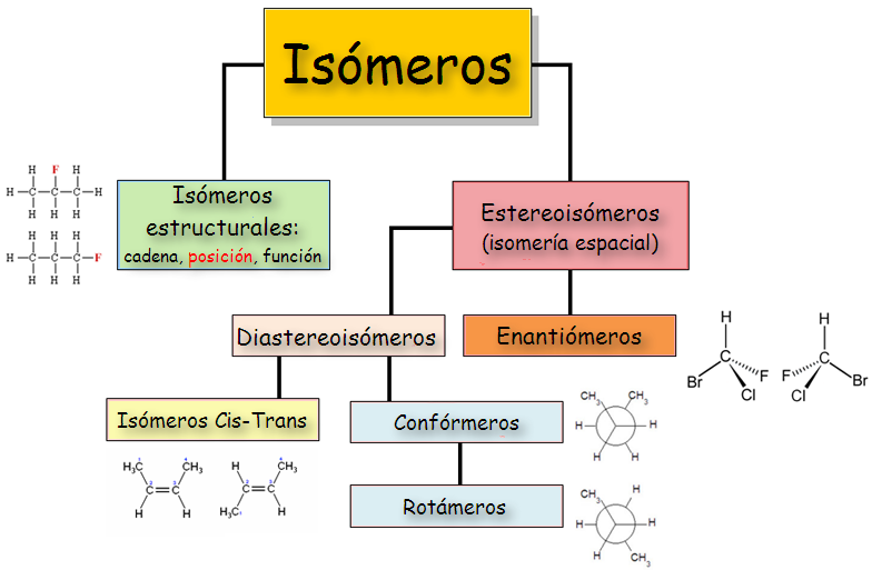 Clasificación de los isómeros en Química orgánica: Estructurales: de cadena, de posición y de función. Estereoisómeros: enantiómeros y diastereoisómeros: confórmeros (rotámeros) e isómeros cis-trans